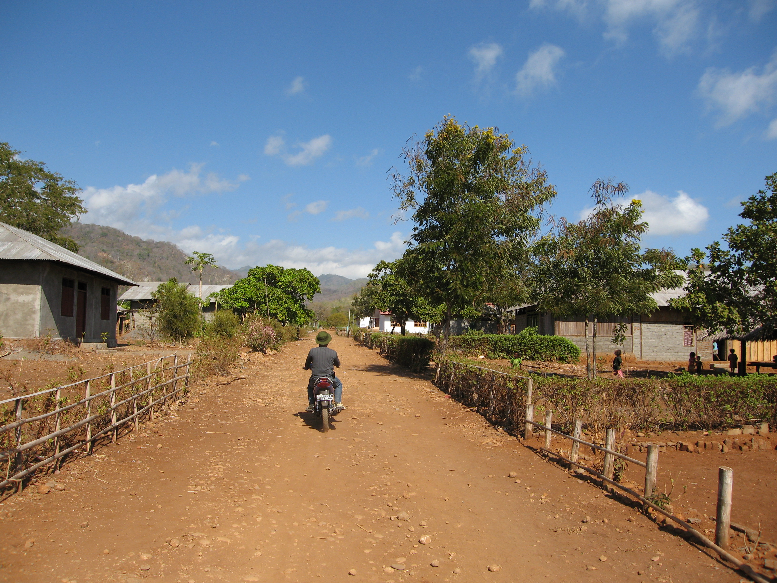 Hamlet Kirakela, Masusamang, East Alor, NTT